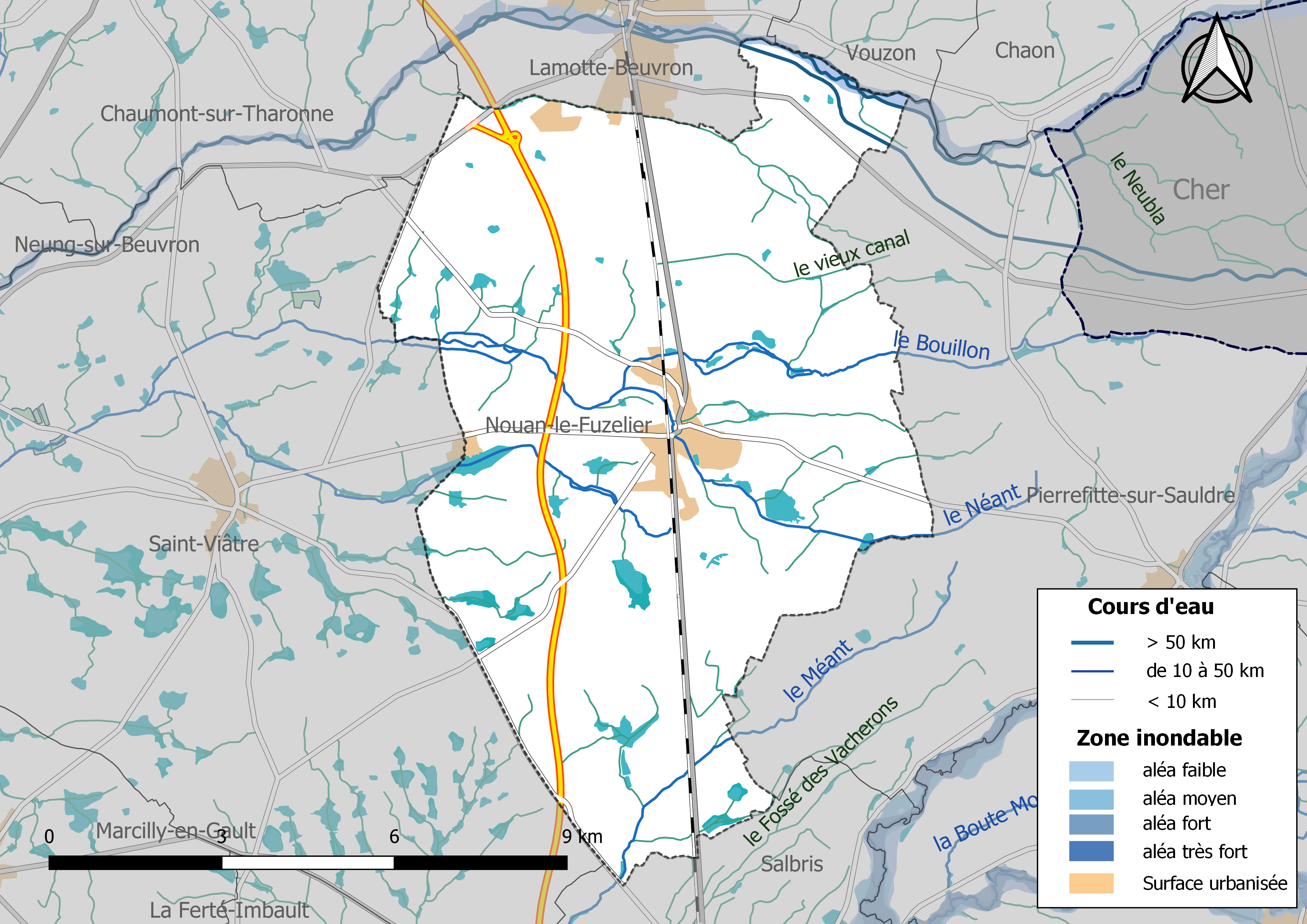 Carte des zones inondables de la commune de Nouan-le-Fuzelier (France).